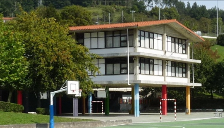 Lauro Ikastola